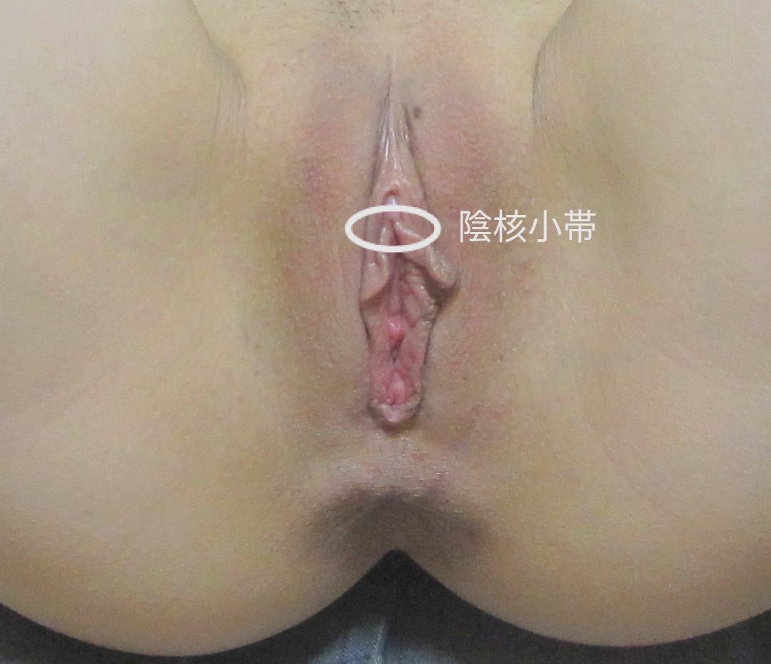 陰核小帯(実写)